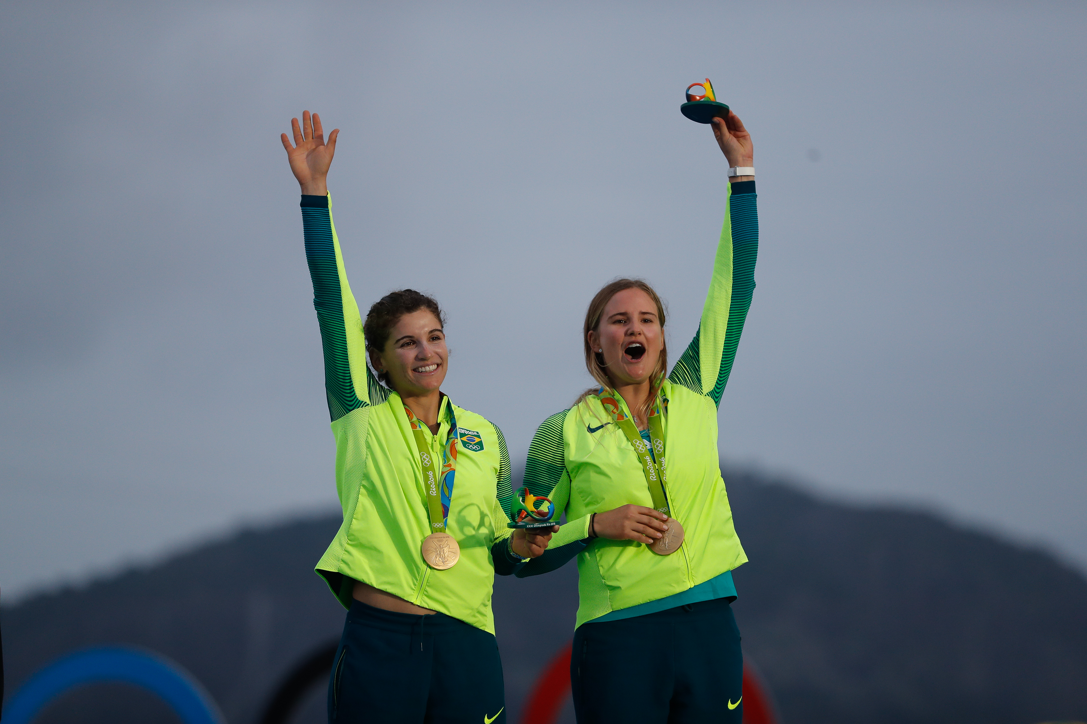 Rio de Janeiro - As brasileiras Martine Grael e Kahena Kunze conquistaram o ouro na classe 49er FX da vela dos Jogos Olímpicos Rio 2016, na regata final na Baía de Guanabara (Fernando Frazão/Agência Brasil)